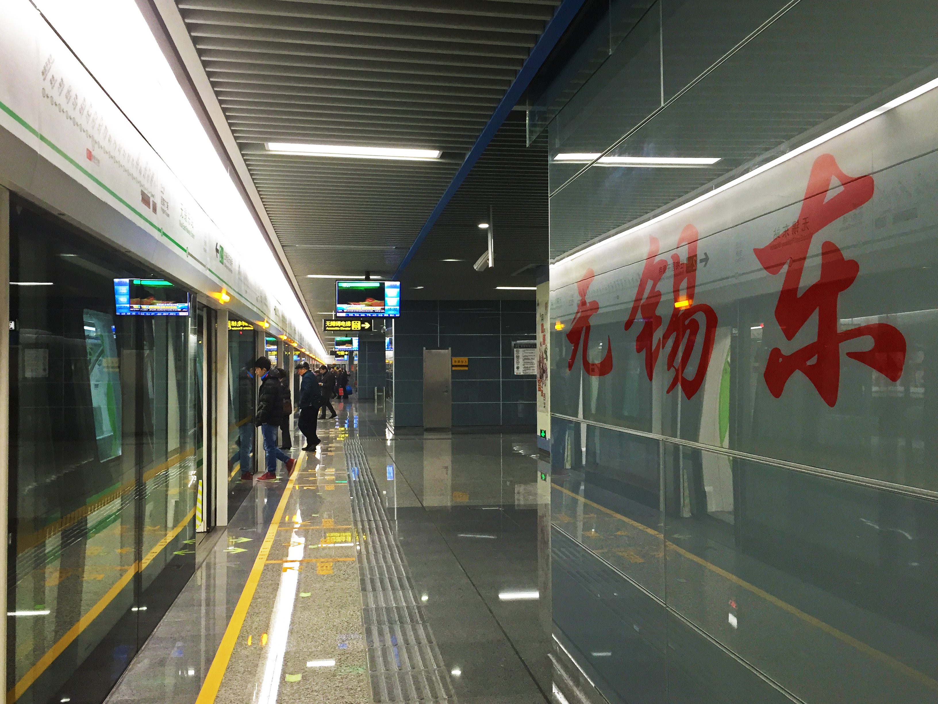 無錫東站地鐵站站臺